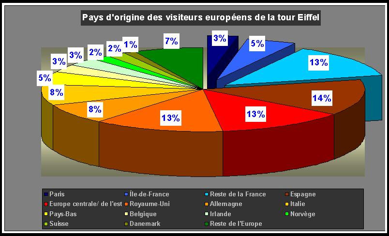 *Pays d'origine des visiteurs européens de la tour Eiffel; d'après une enquêtre de l’institut de sondage TNS Sofres, réalisée en 2005. Fichier réalisé par moi-même (Utilisateur:Kuxu) sous Excel, puis importé sous paint.